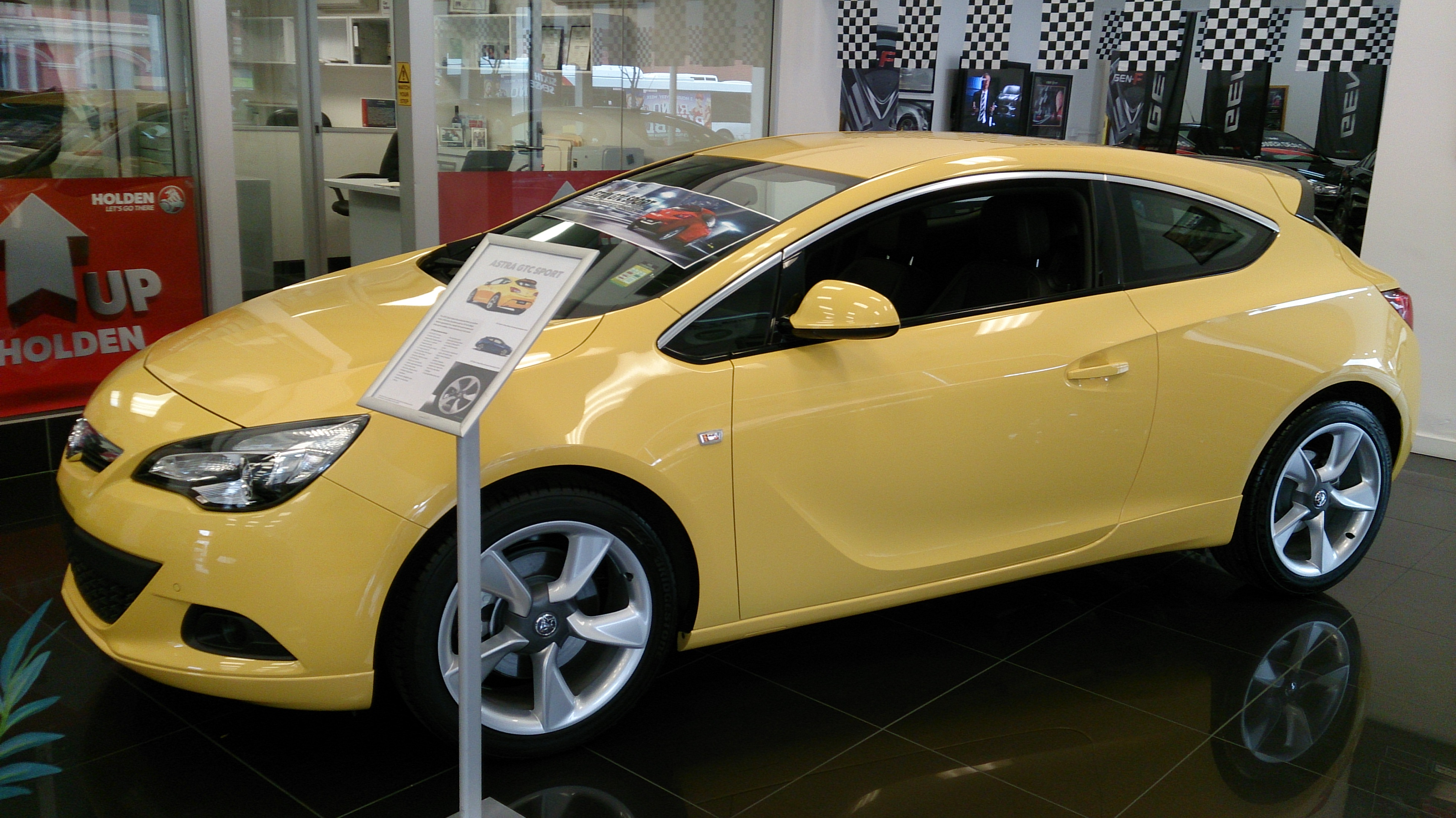 Holden Astra GTC Sport (PJ series)